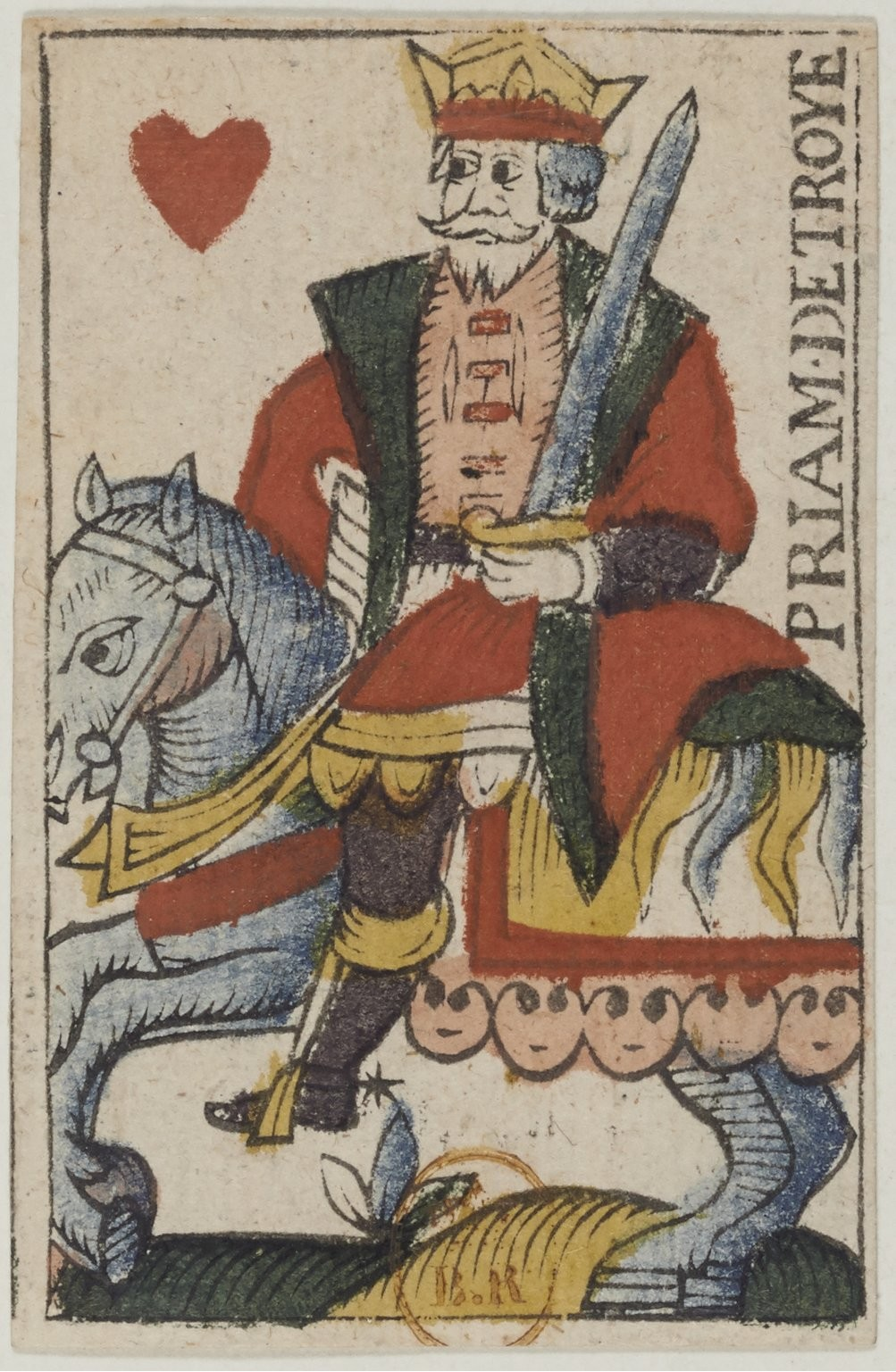 Król Kier z Wzoru Jeździeckiego